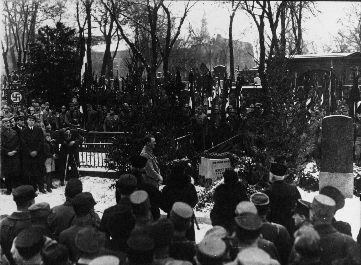 Adolfo Hitler en 1933 una celebración nazi en un cementerio en 1933.